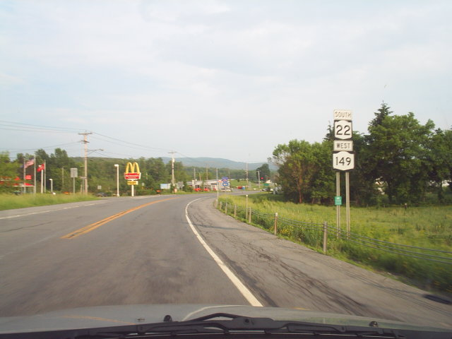 M3367S-4504